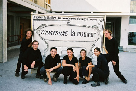 Théâtre de rue à Ayent (Valais), chantier du Service Civil International (SCI), "Festival du film itinérant du Val d'Hérens", sur le racisme, l’antisémitisme et la xénophobie, en Suisse.